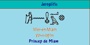 Jeroglífic creat per Elena Moragas Pascual.